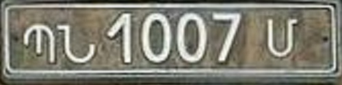 Военный автомобильный номер Армении